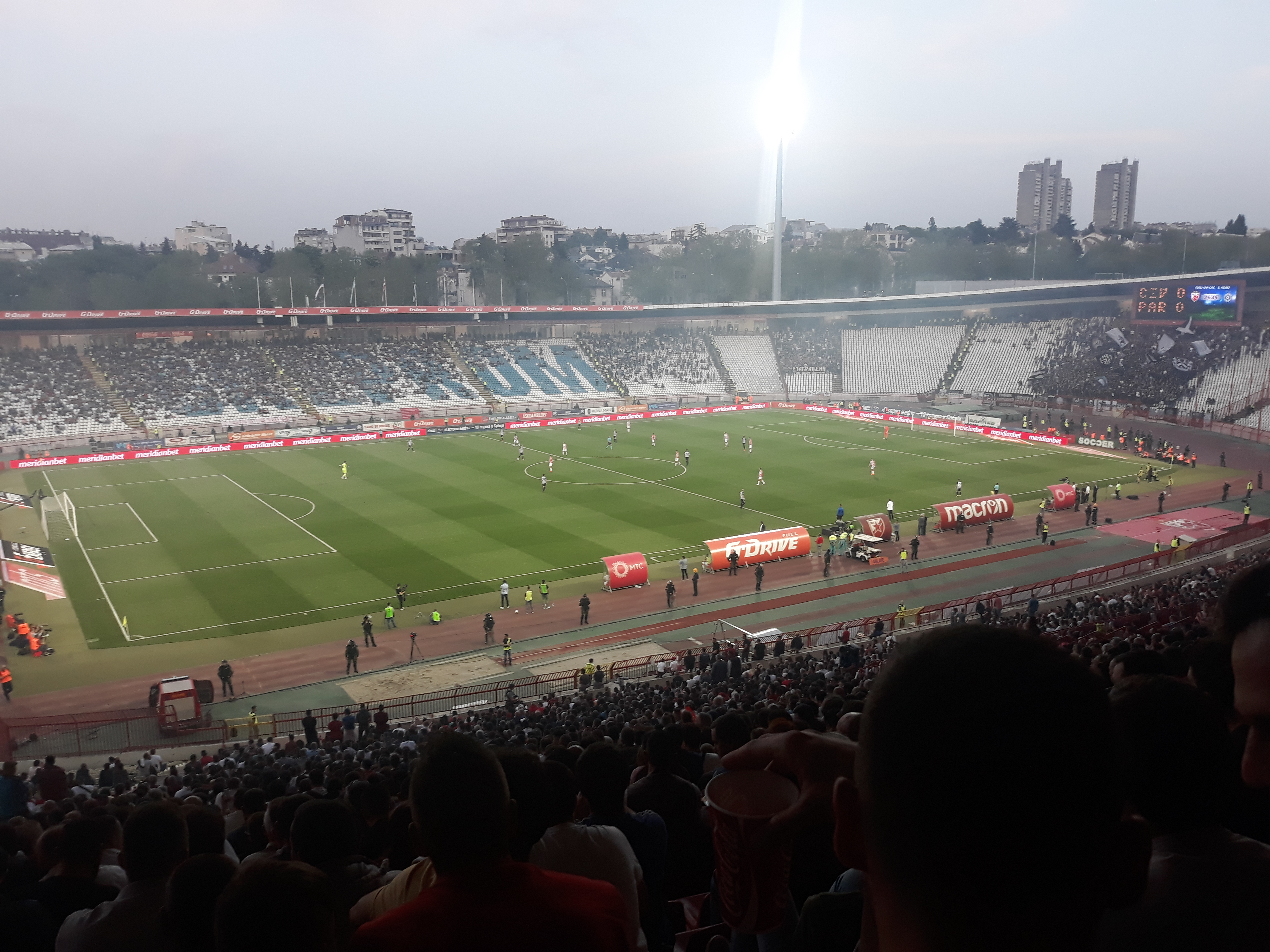 160. Вечити дерби, између Црвене звезде и Партизана, одигран на Стадиону Рајко Митић у Београду.